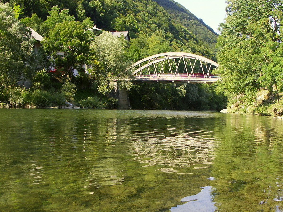 Most čez Idrijco v Dolenji Trebuši.